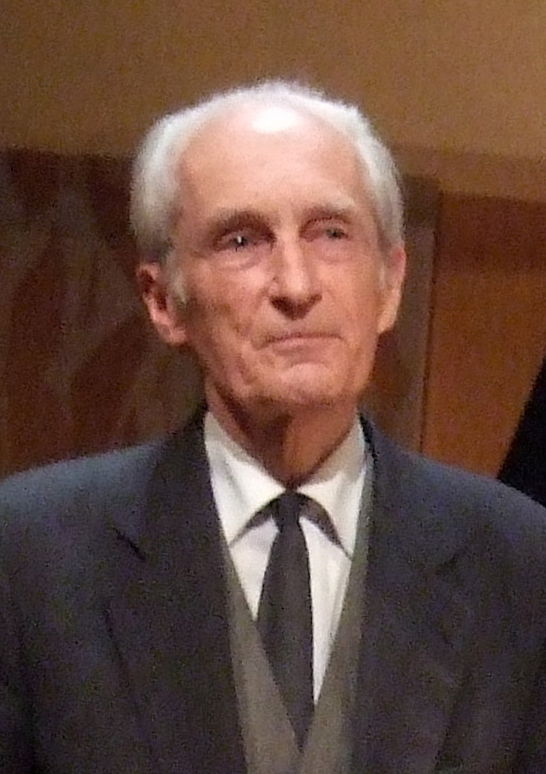 Gustav Leonhardt (Cité de la Musique, Paris).